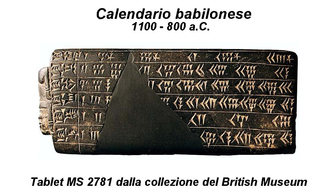 Calendario Babilonese Tablet MS 2781 (British Museum)